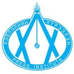 Монгол: Монголын хэвлэлийн хүрээлэнгийн албан ёсны лого